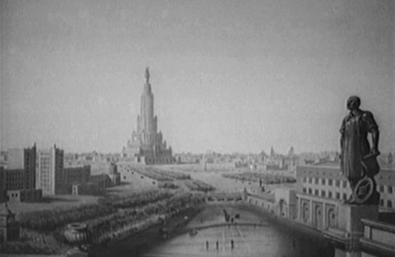 Кадр из фильма "Новая Москва"